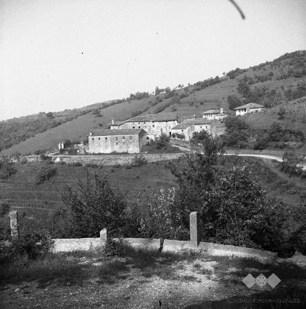 Pogled na Belo s ceste proti Noznem.